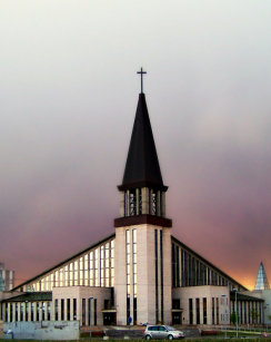 Mažeikių Šv. Pranciškaus Asyžiečio bažnyčia